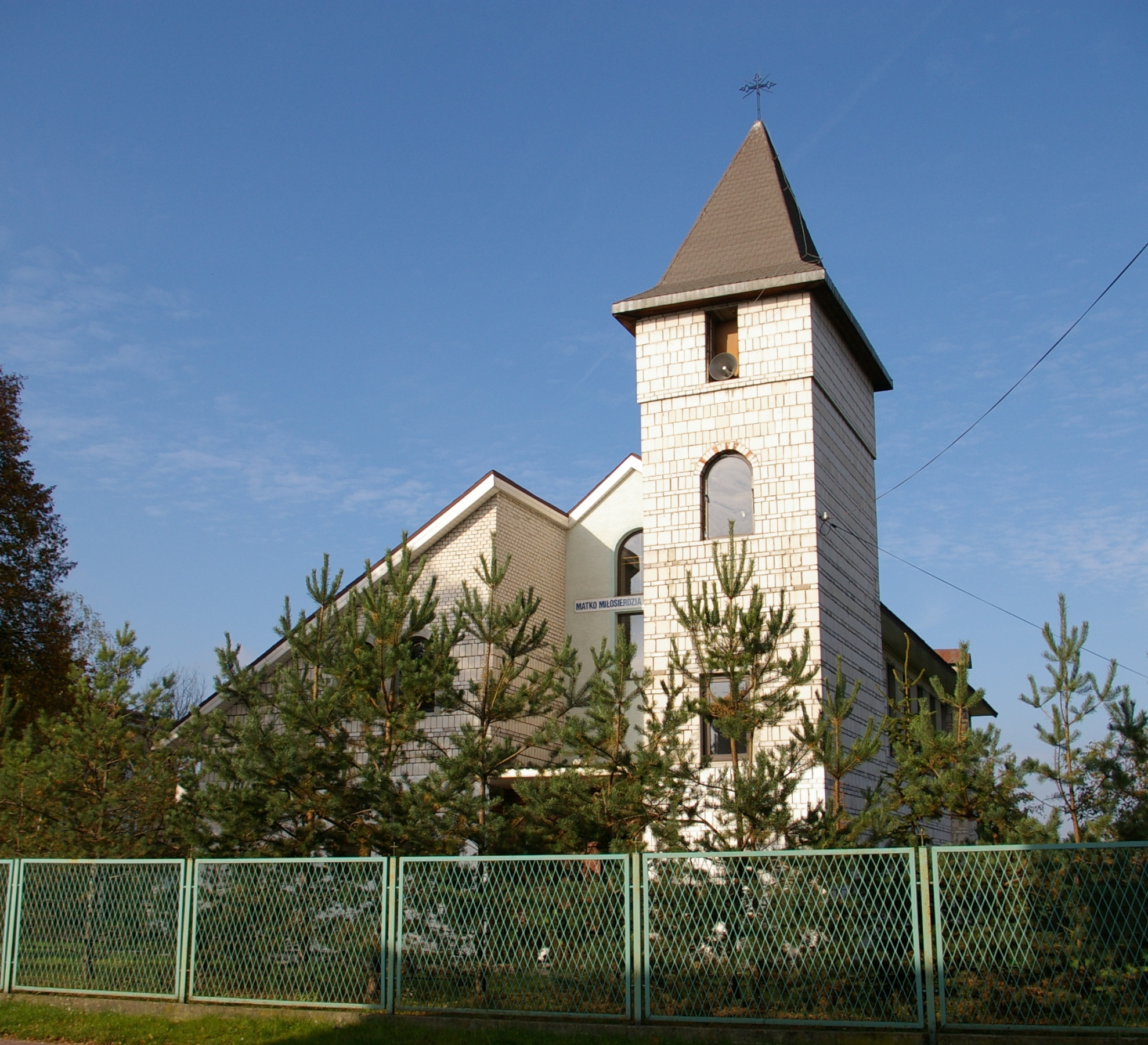 Polskokatolicki kościół Imienia Najświętszej Marii Panny w Ostrowcu Świętokrzyskim